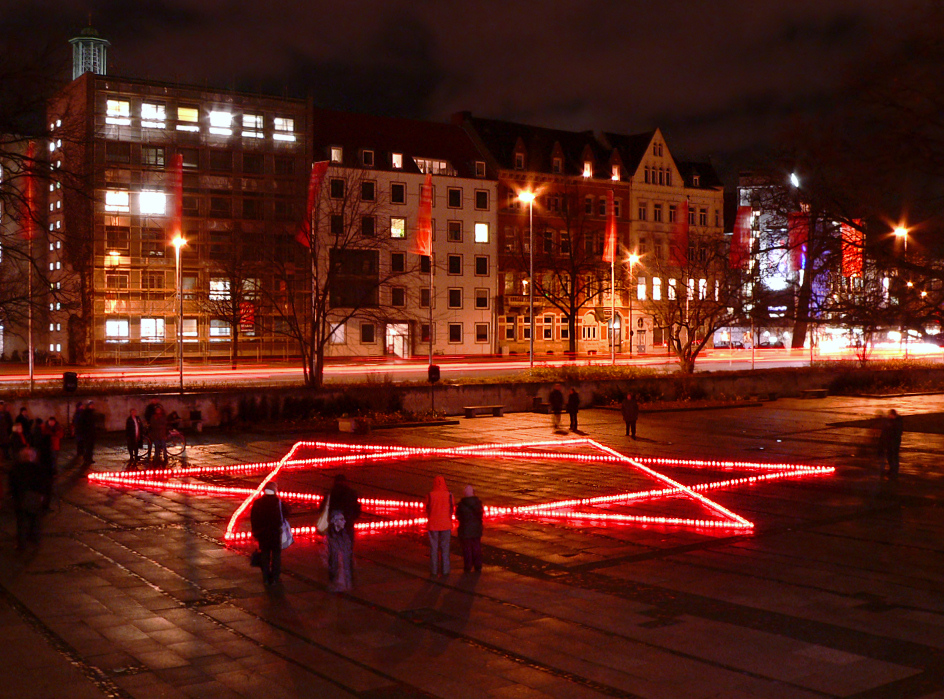 Lichteraktion am 15. Dezember 2011 mit dem Aufstellen von 1001 brennenden Kerzen auf dem Trammplatz zur Erinnerung an den 70. Jahrestag der ersten Deportation jüdischer Menschen ins Ghetto Riga mit 1001 Personen am 15. Dezember 1941